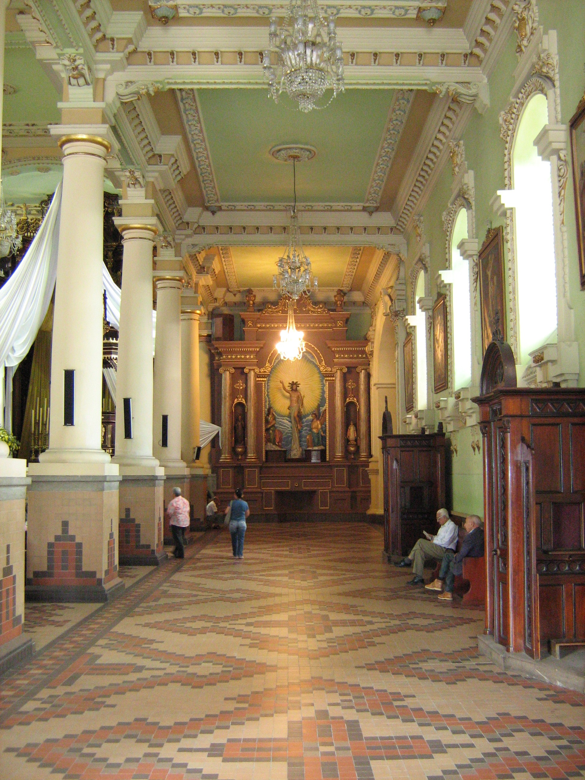 Iglesia de Santa Gertrudis en Envidado, Antioquia, Colombia